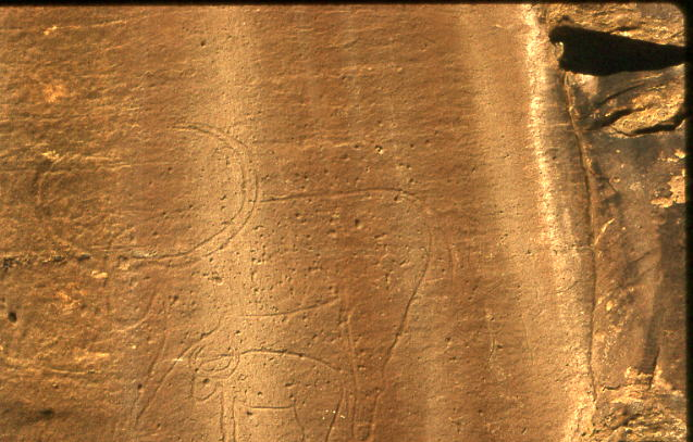 Gravures préhistoriques de la région d'El Bayadh, Algérie